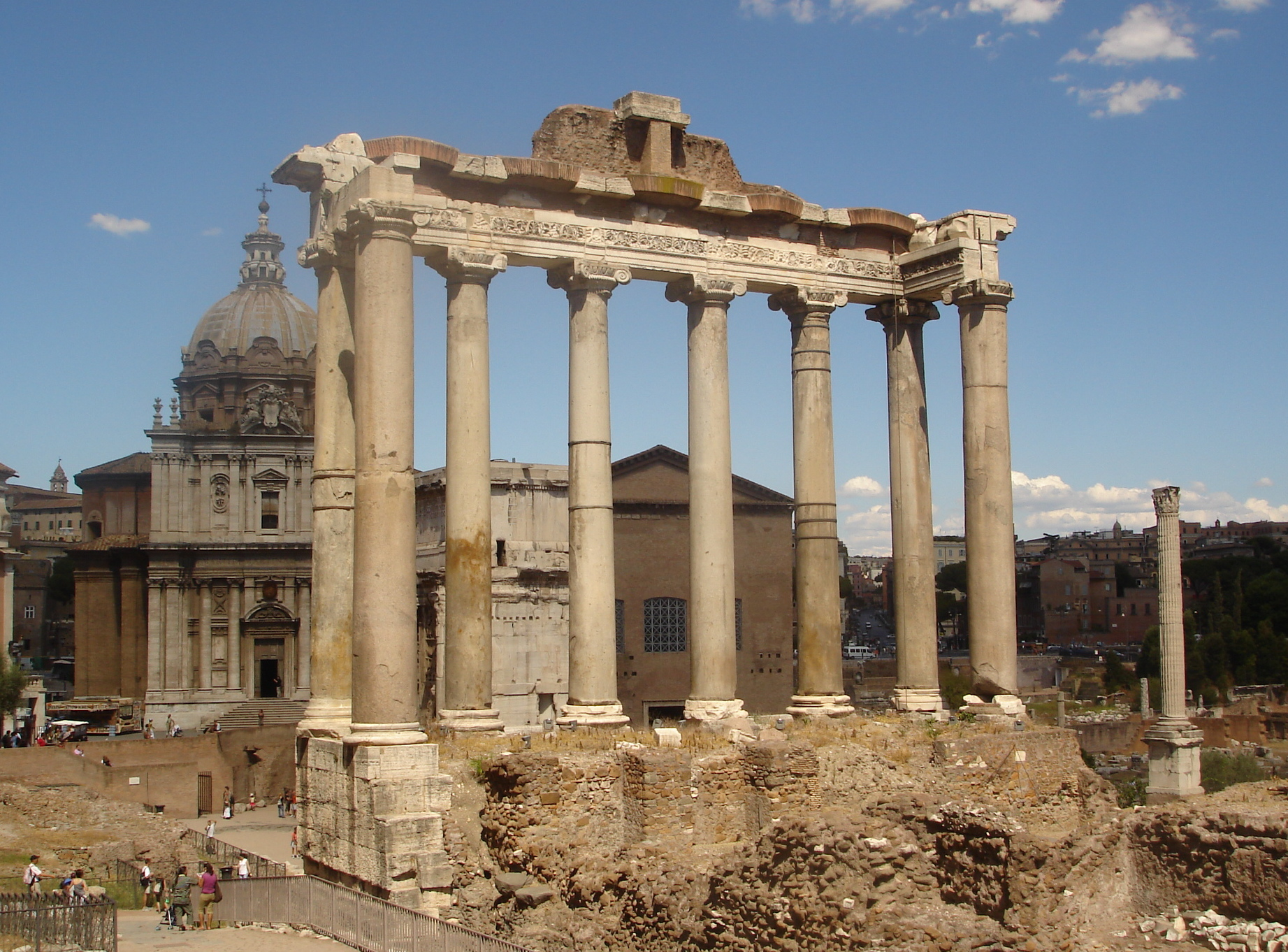 O templo de Saturno com a igreja Santi Luca e Martina ao fundo.